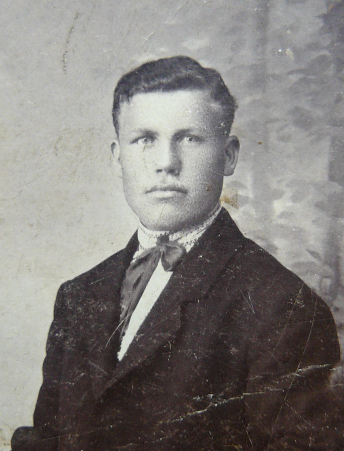 Отаман Бурлака (справжнє ім'я — Гончар Овсій Іванович; 1888 — 1921) — відомий громадський і військовий діяч на Київщині у 1917–1921 роках — періоду Української національно-визвольної революції.